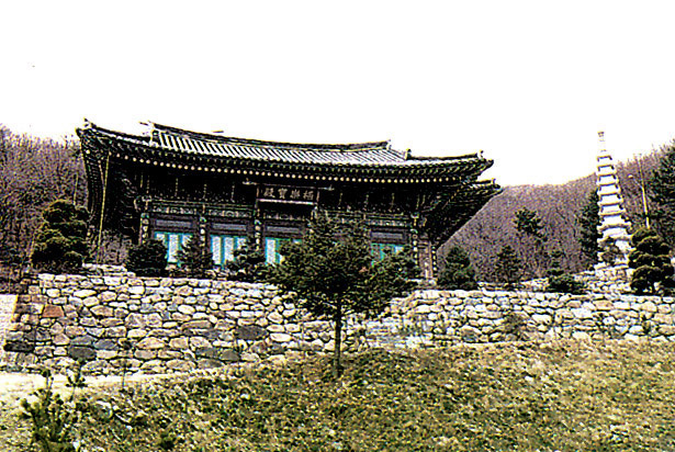 경기도 기념물 제111호 망월사지 (望月寺址)